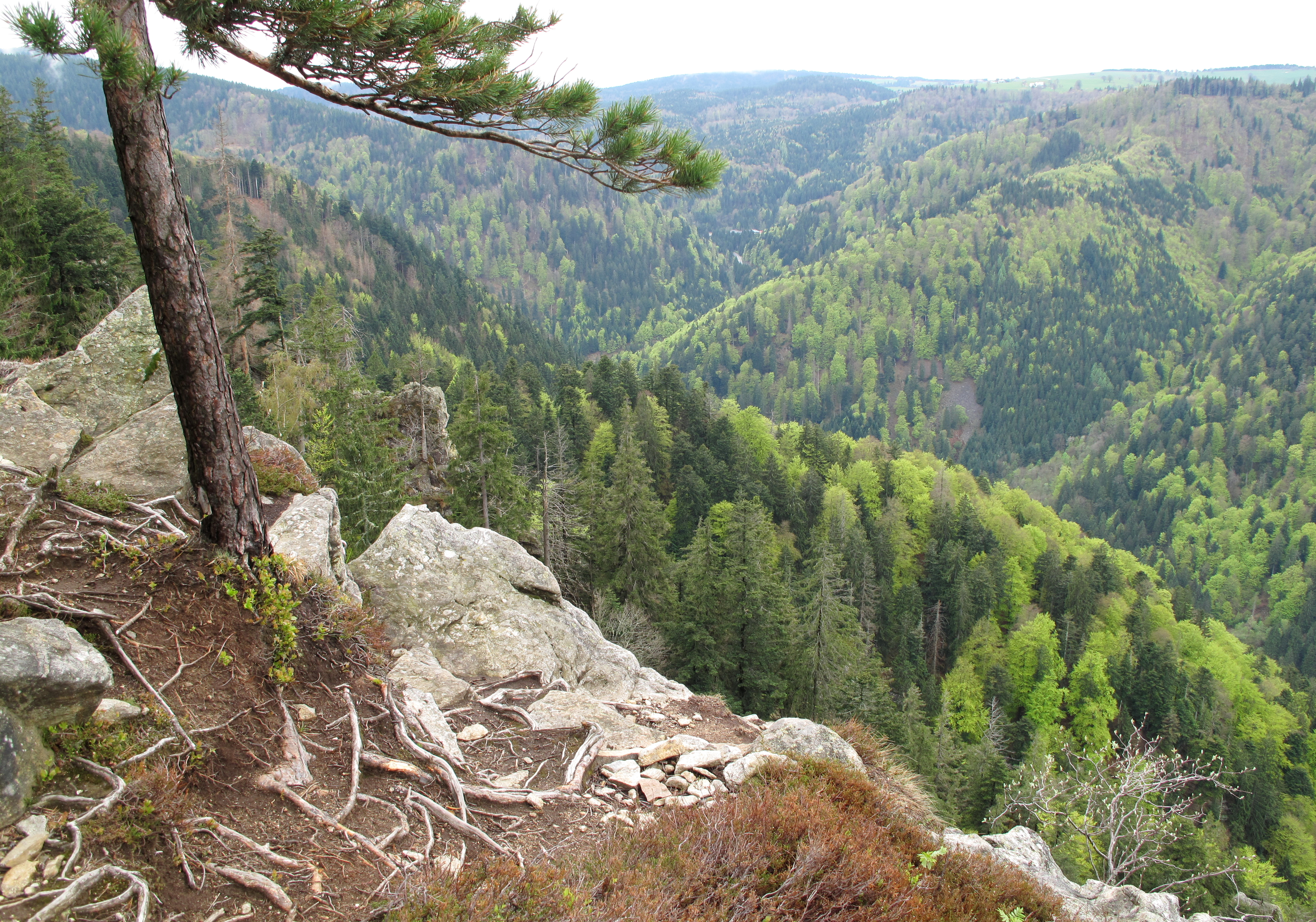 Blick vom Kletterfelsen der G´fällmatte auf den östlich gelegenen Bergkamm mit der Burgstelle der Wilden Schneeburg.